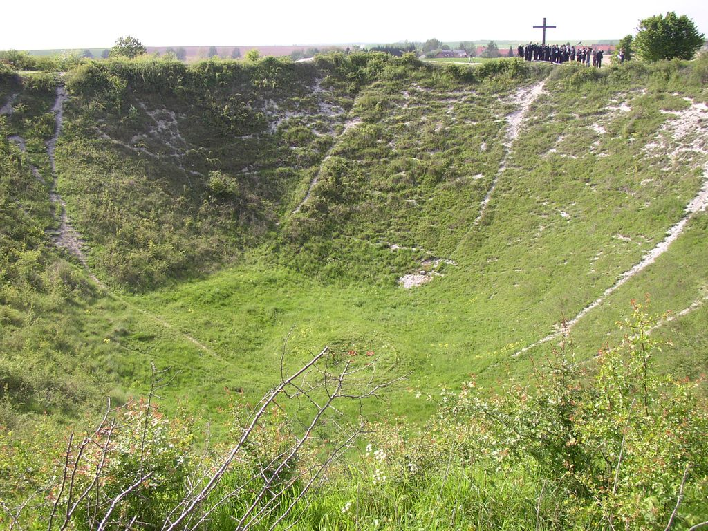 Trou de mine, appelé Lochnagar Crater, à Ovillers-la-Boisselle